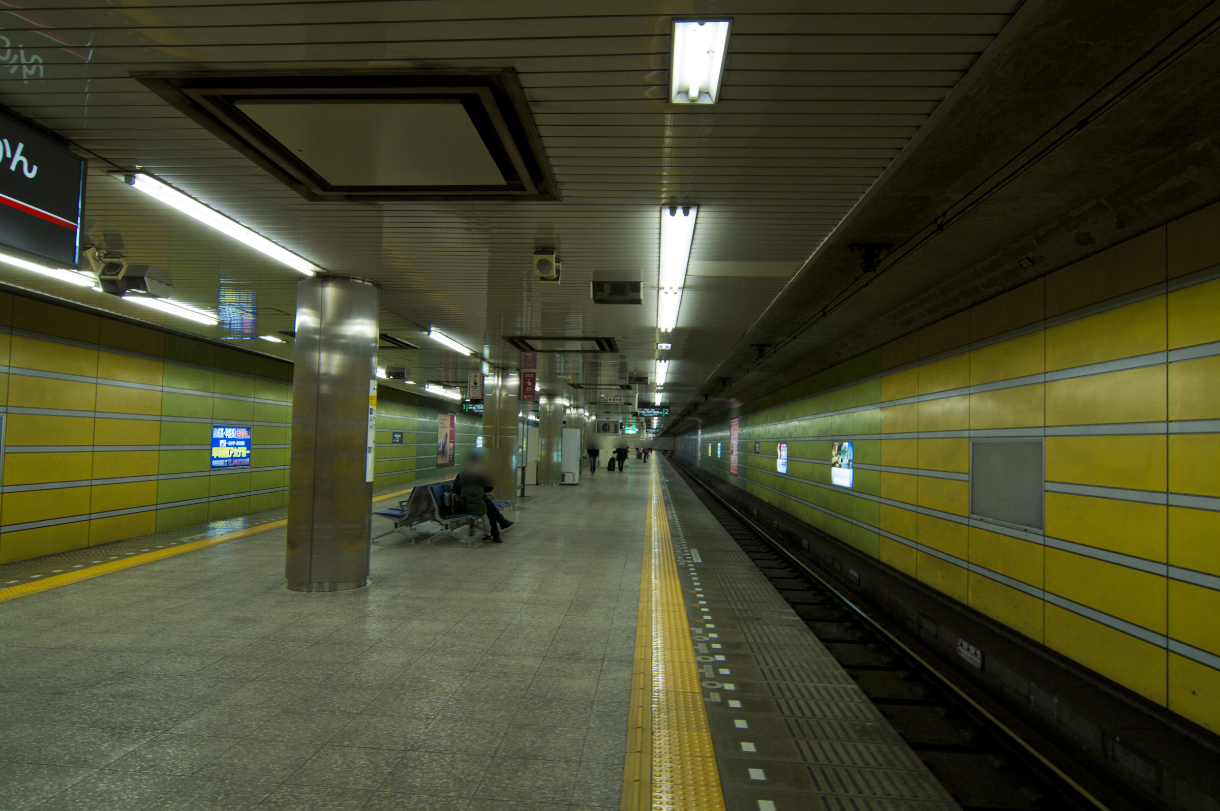 東京急行電鉄田園都市線中央林間駅ホーム